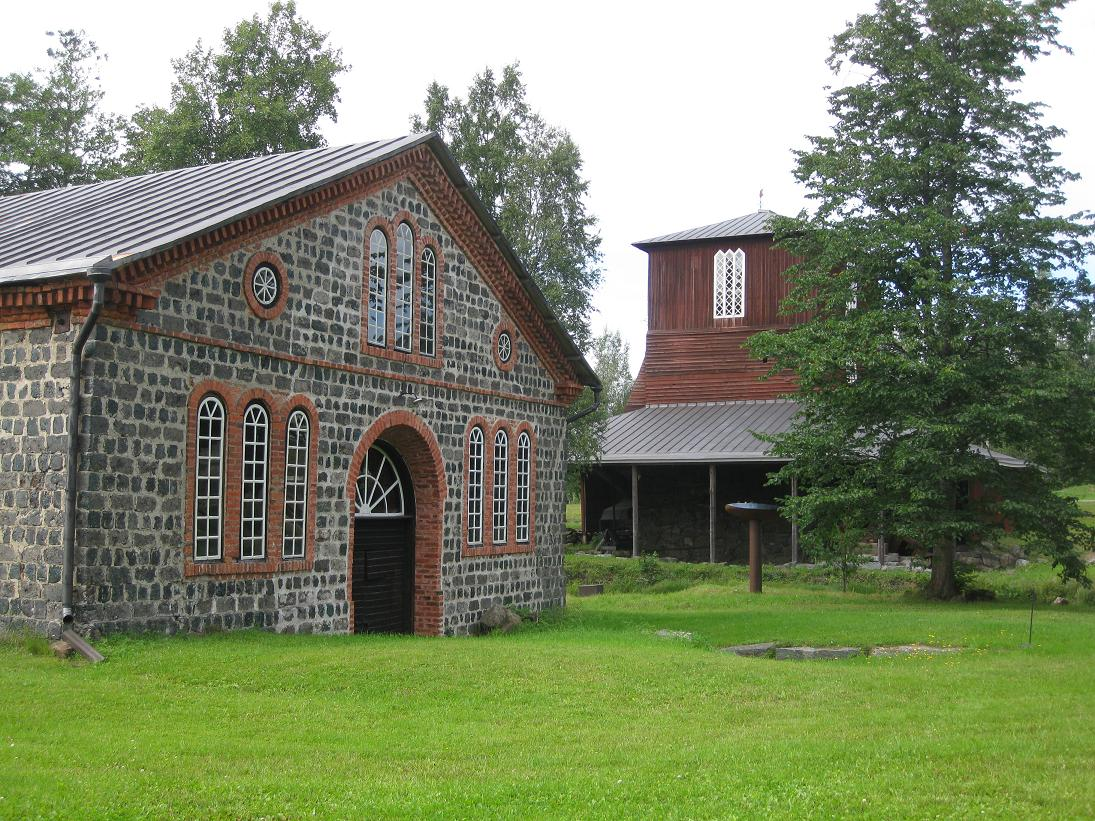 Leineperin ruukki